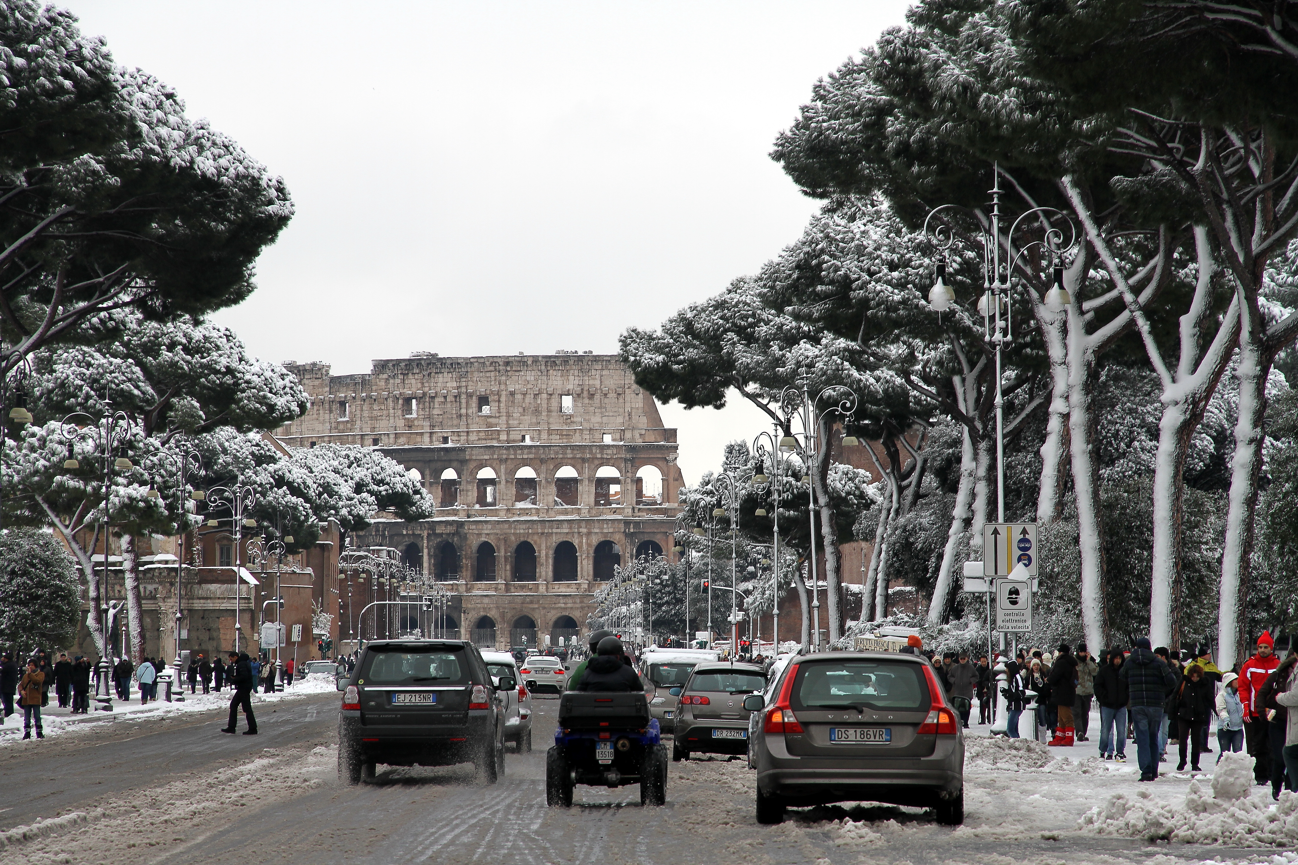 Roma. Colosseo.